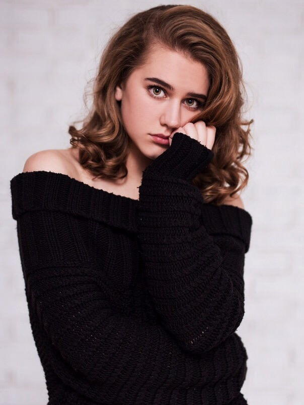 Kerli Elina Paaslepp